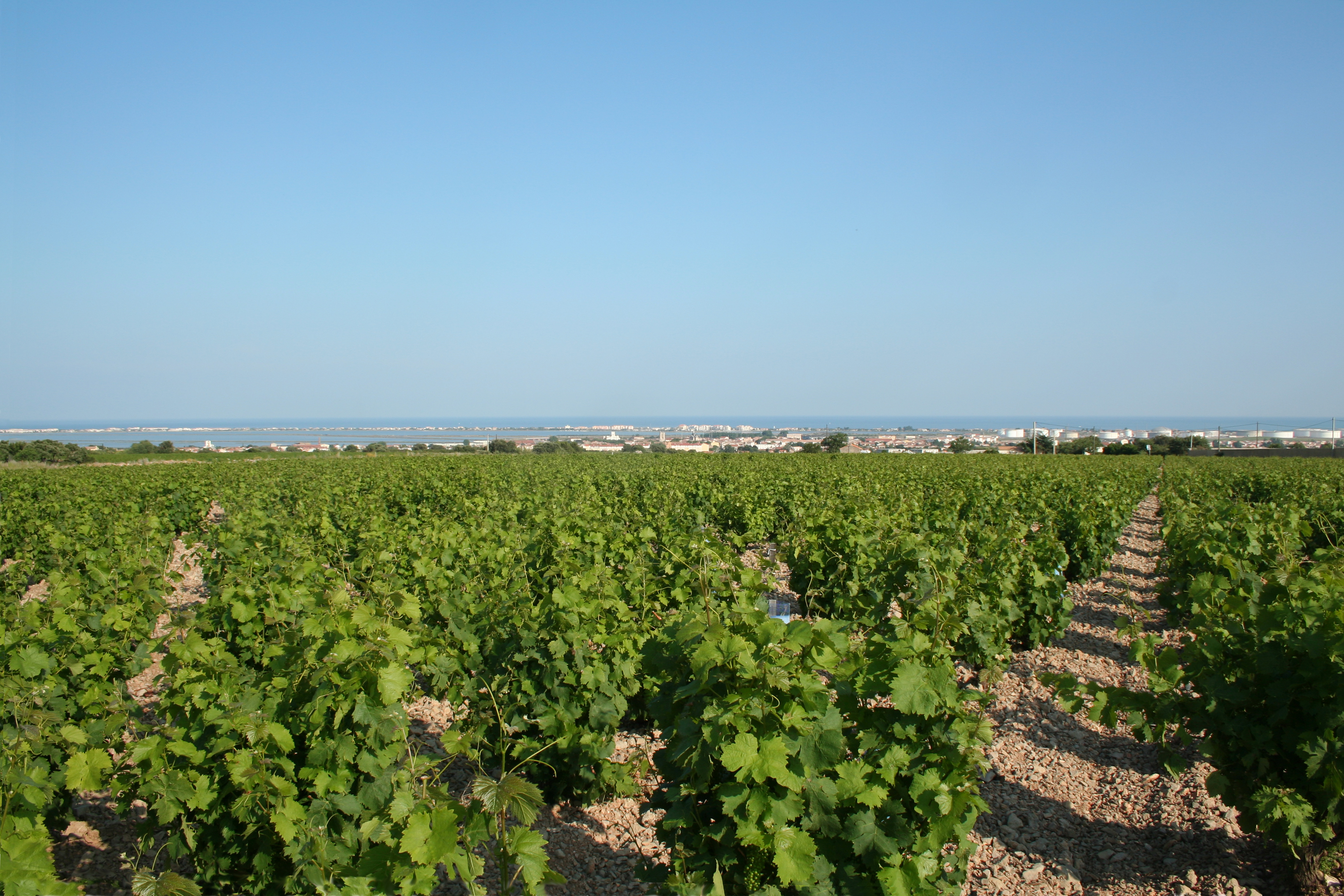 Frontignan (Hérault) - Les vignes de muscat; vue générale sur la ville (visibles le clocher de l'église et la mairie), l'étang d'Ingril, Frontignan-plage et la Méditerranée.